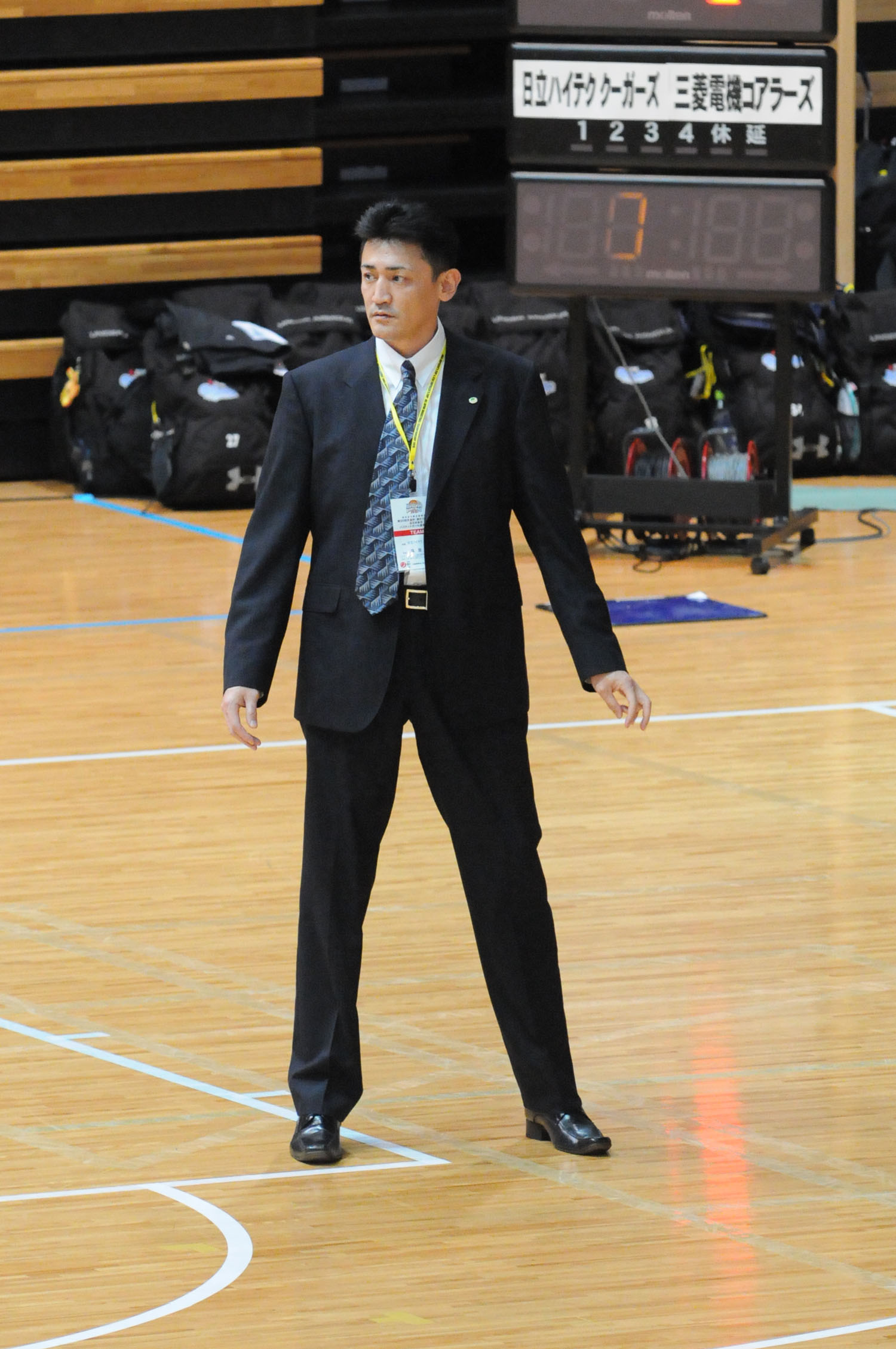 日立ハイテク クーガーズ、塩屋透コーチ。大田区総合体育館で。